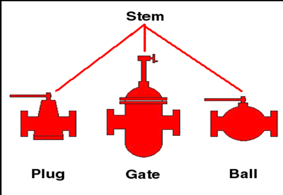 ساقه در شیرهای گوناگون - تصویر آموزشی